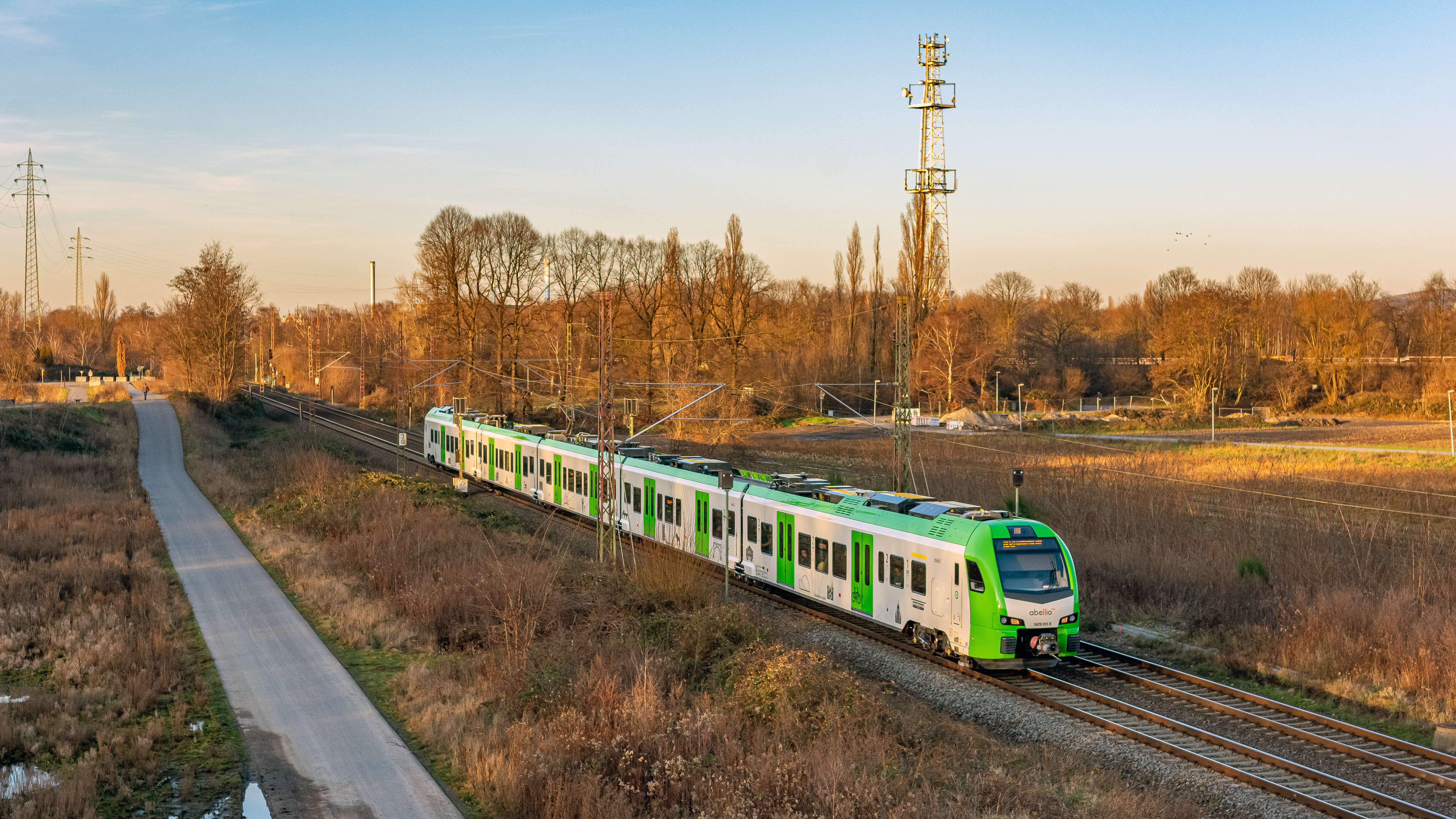 Sinds de nieuwe dienstregeling, die in december 2019 inging, heeft Abellio verschillende S-Bahn trajecten overgenomen van DB-Regio. Deze worden onder meer gereden met nieuwe Flirt XL stellen, in een groen/witte uitvoering. Bij Oberhausen Sterkrade rijdt Abellio Flirt XL 3429 015 als RE49 voortaan tussen Wesel en Wuppertal Hbf. Hier treinnummer 31920.